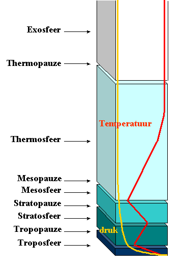 Atmosfeer - eigen werk naar voorbeeld NASA